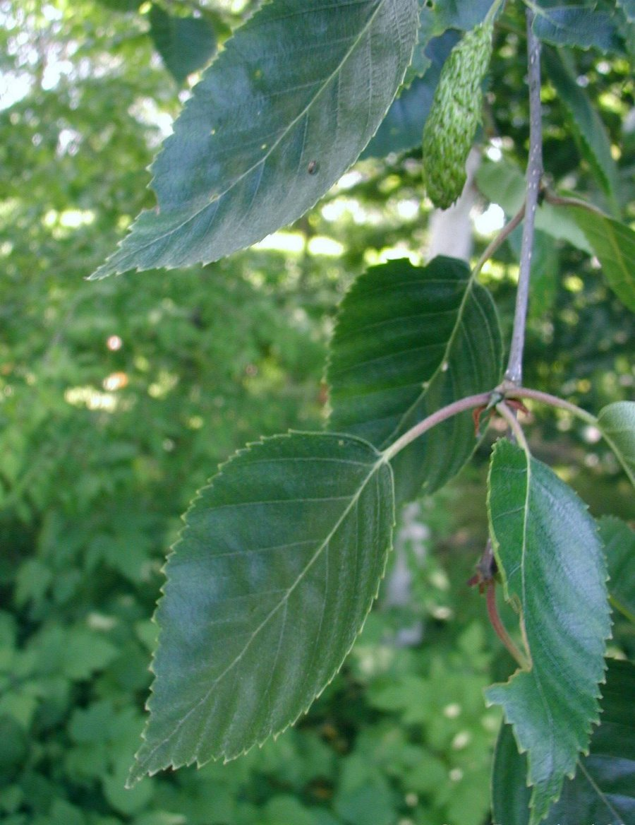 Betula utilis: Leaves.